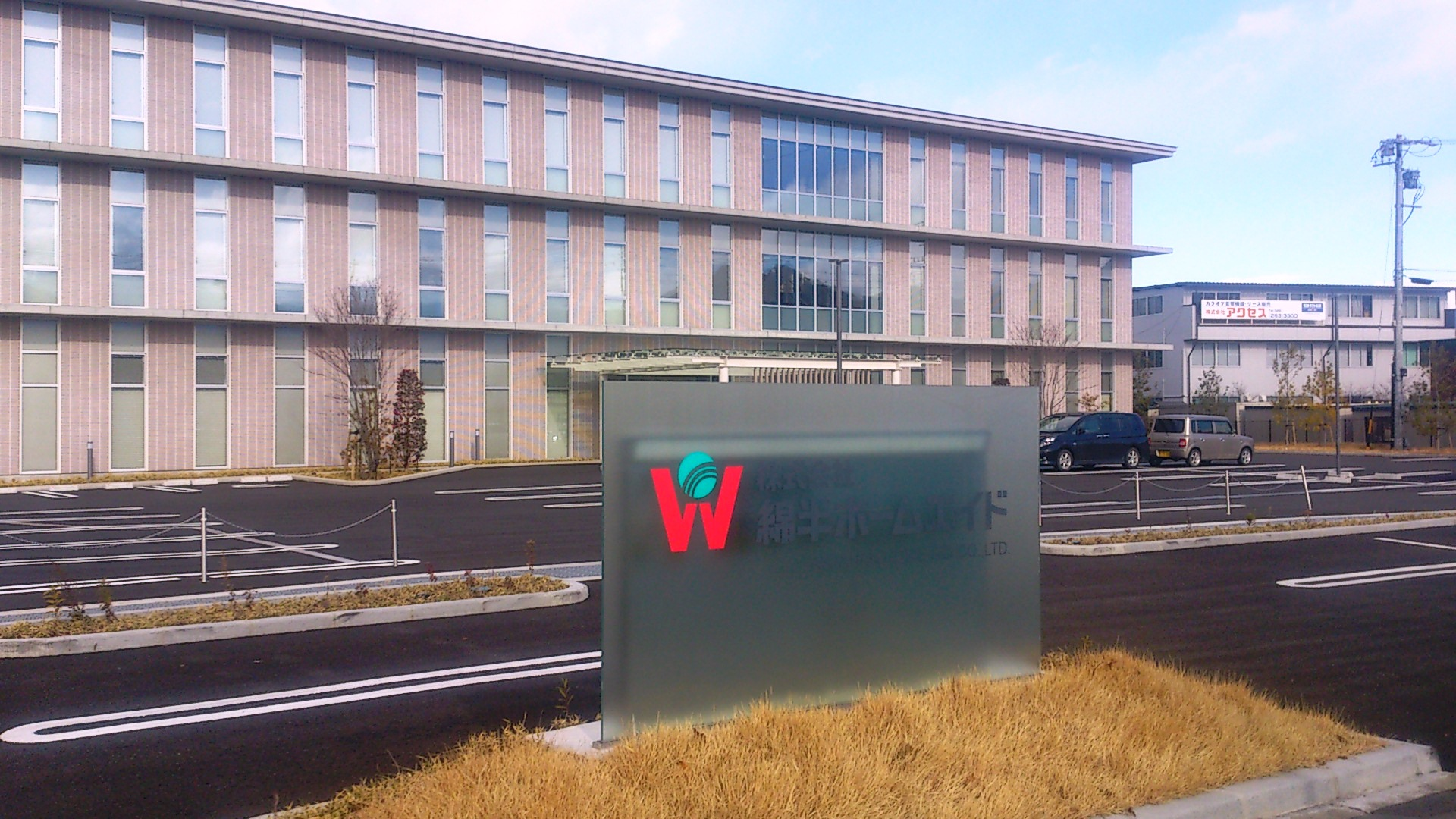 綿半ホームエイド本社（長野県長野市南長池）